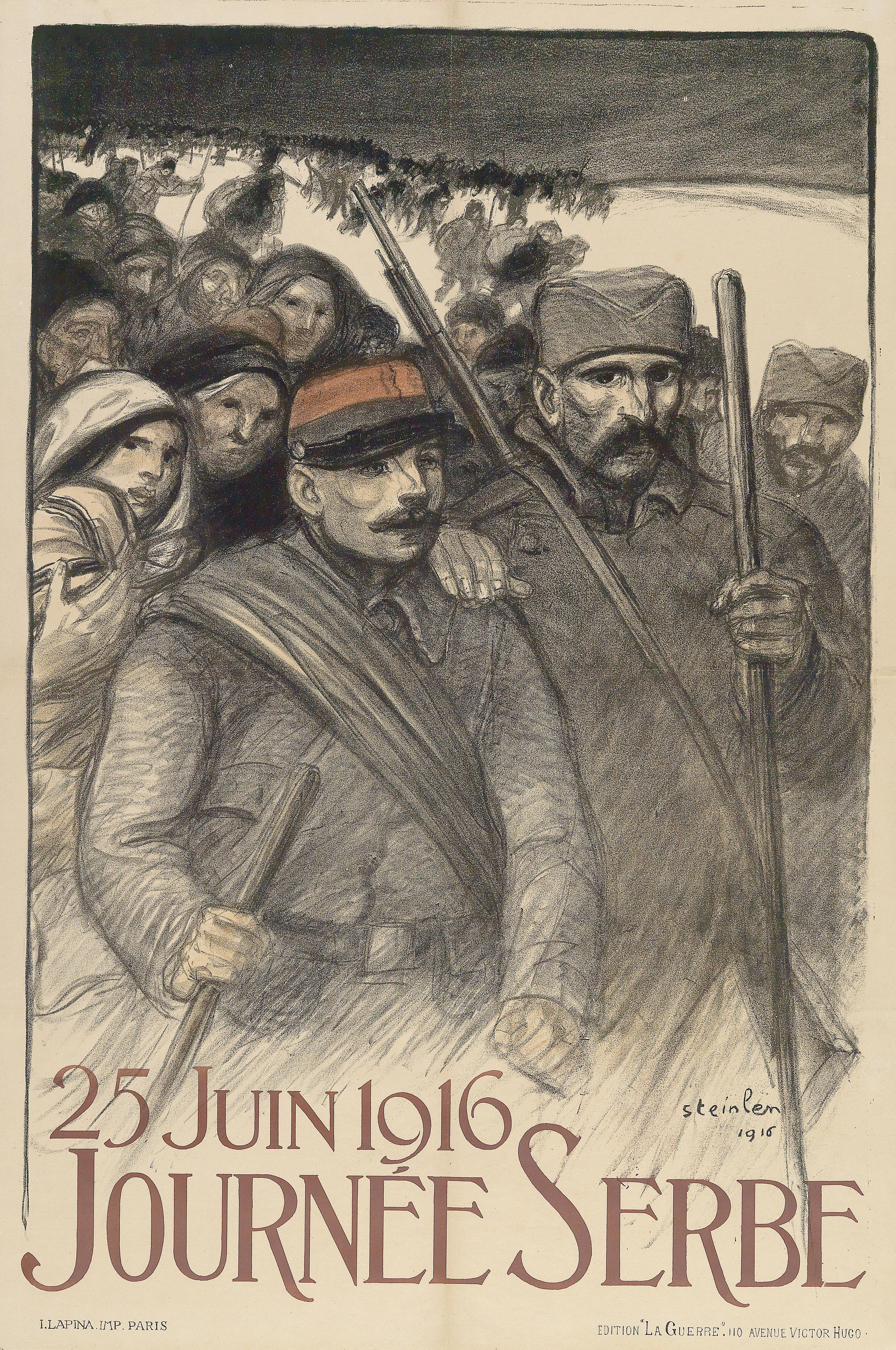 "25 Juin 1916 - Journée Serbe" Frankreich, 1916, 80 x 120 cm, Druck: I. Lapina, Paris